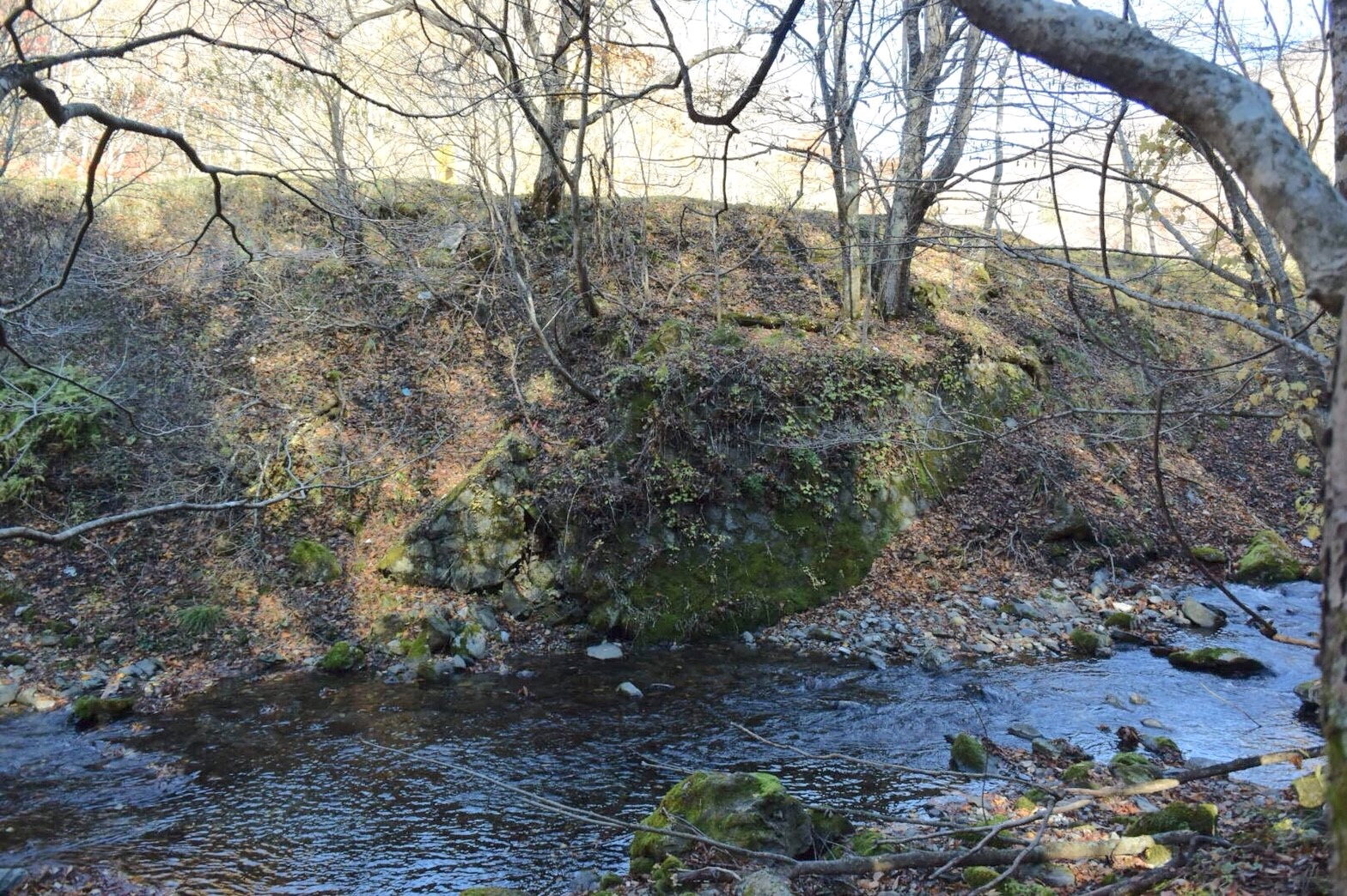 遠野市沓掛に残る岩手軽便鉄道仙人峠駅舎前と茶屋を結ぶ木橋の橋台跡。